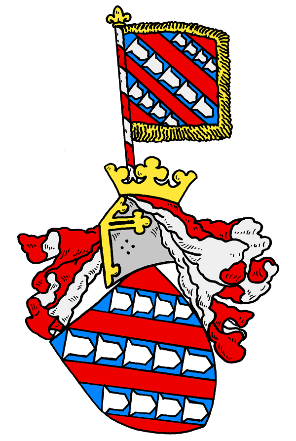 Stammwappen derer von Buquoy